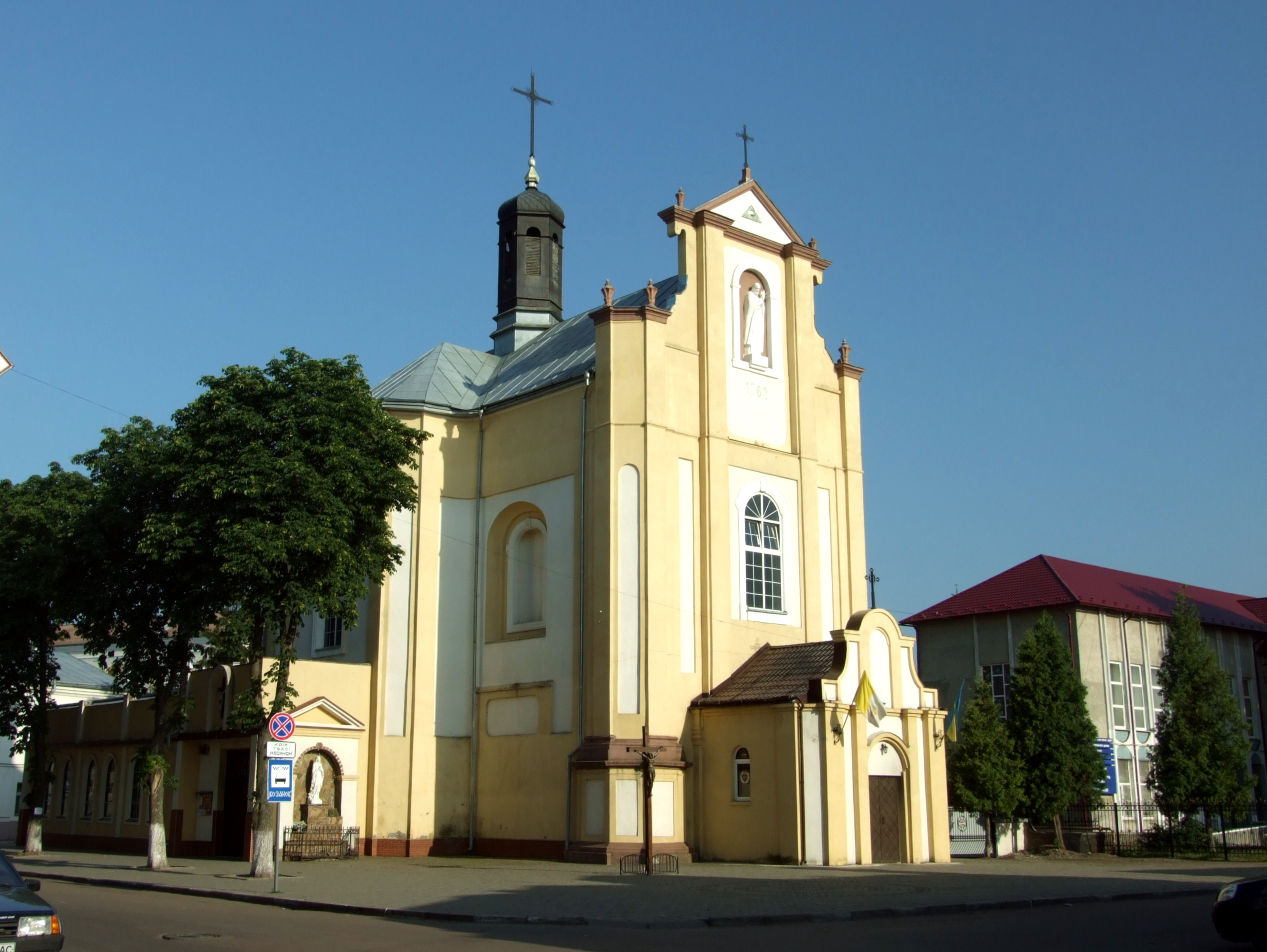 Костел Успіння Богородиці, арх. Бернард Меретин, 1775 р. Відновлення та перебудова, 1895 р.